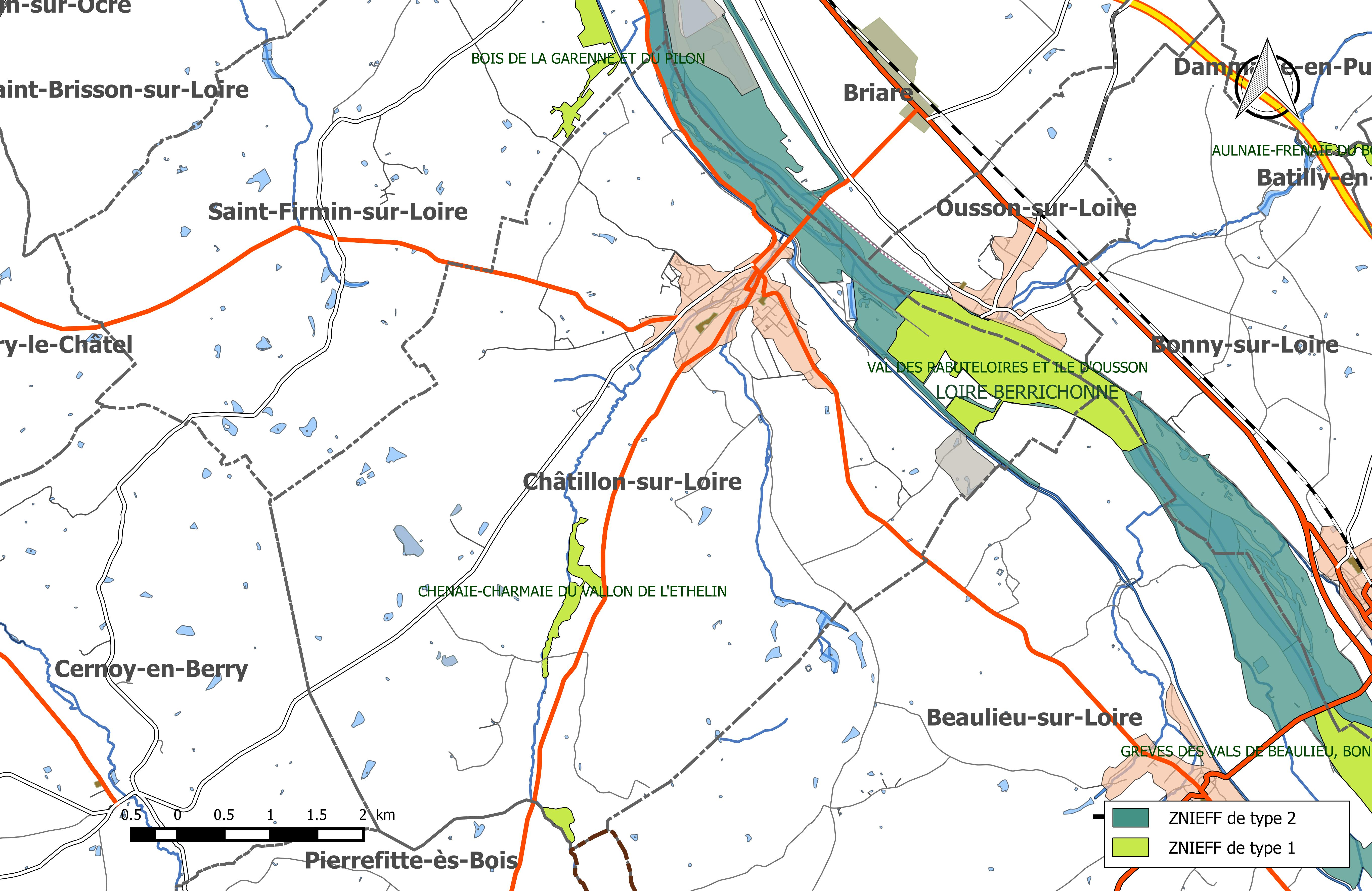 Carte des Zones naturelles d'intérêt écologique faunistique et Floristique (ZNIEFF) de la commune de Châtillon-sur-Loire.